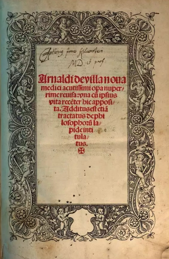 Arnaldus_de_Villa_Nova,_Opera,_Lyon_1520, title page